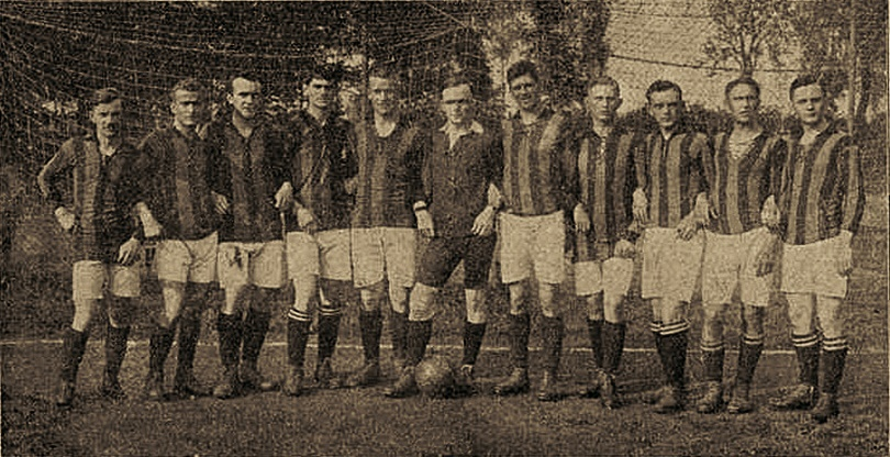 Fußballmannschaft des Beuthener SuSV 09, die im Jahr 1920 oberschlesischer Meister wurde.von links nach rechts: Ede, Fuhrmann, Otto, Ossig, Pustelnik, Eidam, Bongars, Büttner, Hoffmann, Pruschowski, Swoboda